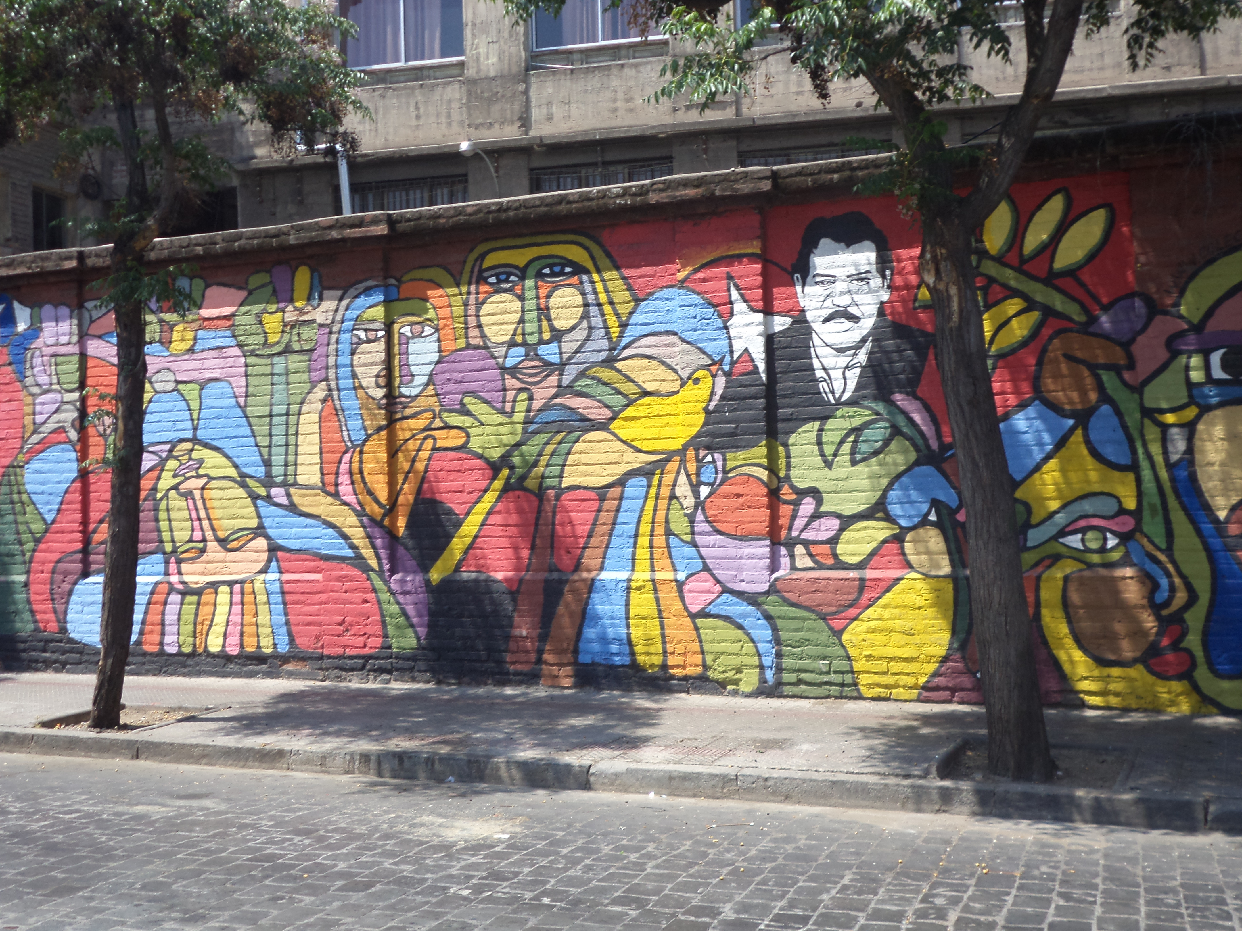 Pinturas murales en honor al militante del MIR Jécar Neghme en el lugar donde fue asesinado durante gobierno de Augusto Pinochet en Santiago de Chile.